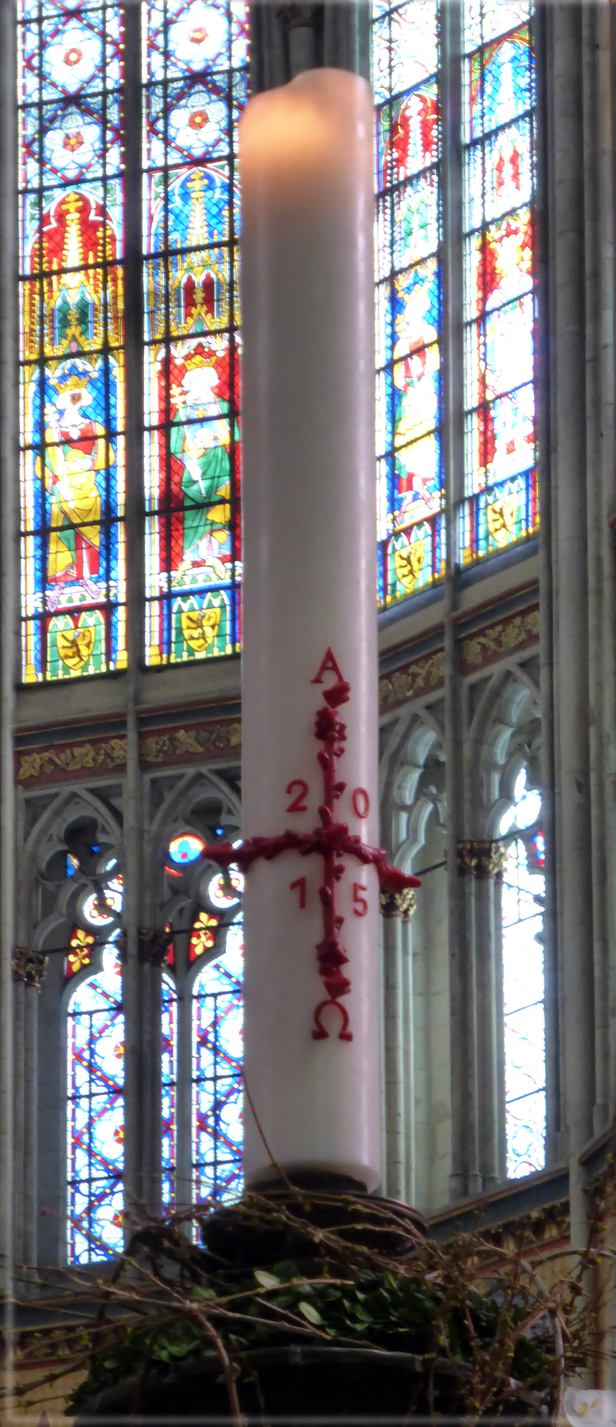 Osterkerze der Joh. Schlösser Wachsbleiche und Kerzenfabrik im Kölner Dom.